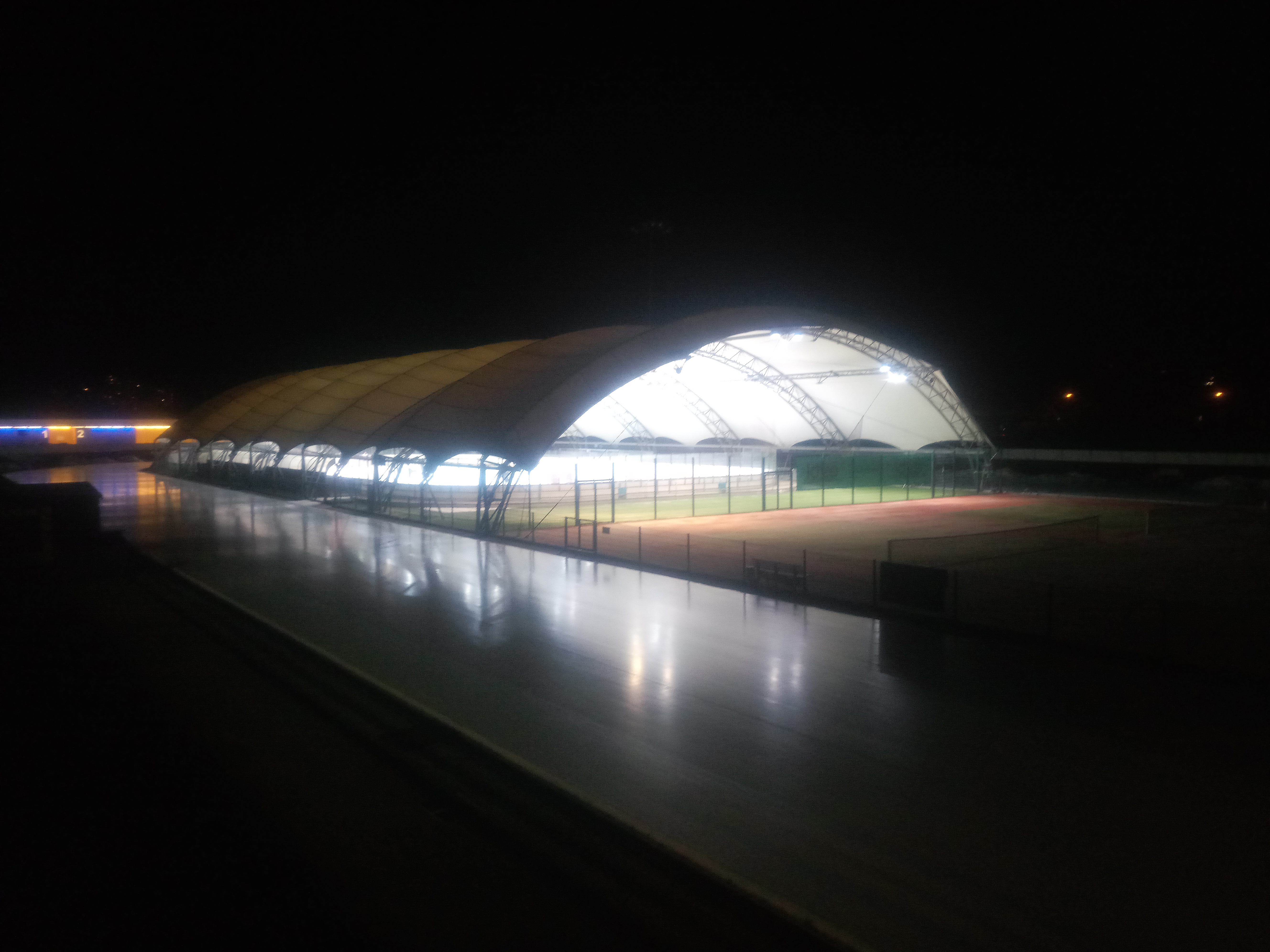 Im Aussenbereich der Eissporthalle Frankfurt befindet sich eine zusätzliche Eisbahn mit einem Zelt.